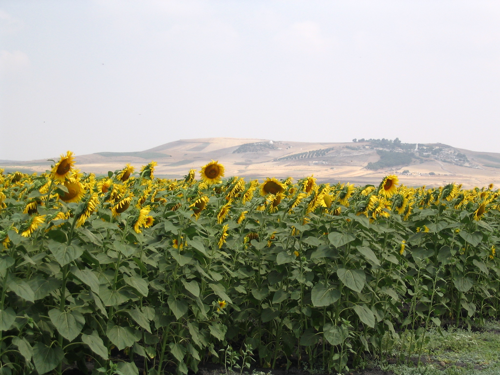 Champ de tournesol - périmètre du Gharb